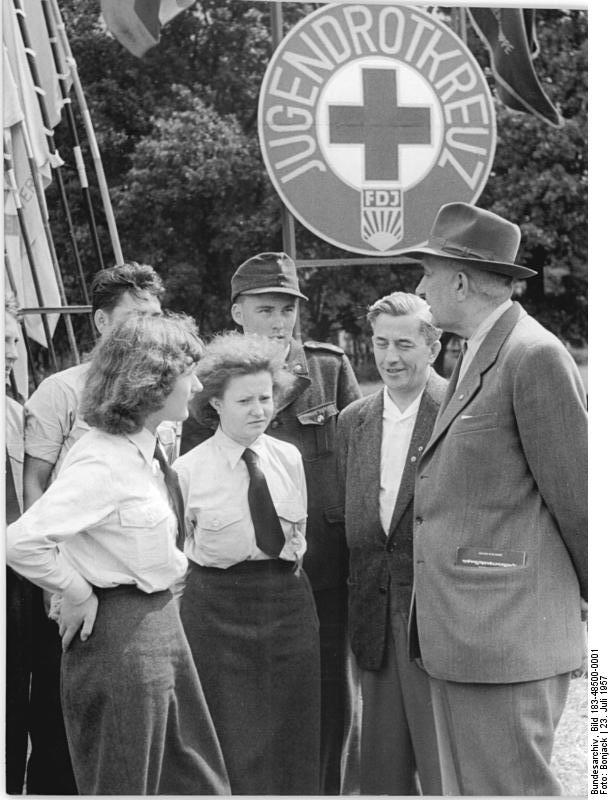 Leipzig, Turn- und Sporttreffen, Jugendrotkreuz, Übung Zentralbild Leipzig 23.7.1957 Bonjack "Wer ist der beste und schnellste Gesundheitshelfer?" Überall, wo was los ist, da sind auch die unermüdlichen Helfer des Deutschen Roten Kreuzes anwesend und greifen sofort ein, wenn jemand eine Hilfe nötig hat. Während des Turn- und Sporttreffens der Jugend in Leipzig führten 15 Mannschaften des DRK einen besonderen "Wettkampf" durch. Die Besten und Schnellsten im Gesundheitshelfereinsatz sollten ermittelt werden. Den Übungen wohnten u.a. der Vizepräsident des Roten Kreuzes der CSR, Franz Janda, und der Stellvertreter des Generalsekretärs des DRK Helmut Geßner bei. UBz: (vlnr): Der Vizepräsident des Roten Kreuzes der CSR, Franz Janda, und der stellvertretende Generalsekretär des DRK, Helmut Geßner, im Gespräch mit Wettbewerbsteilnehmern des DRK.